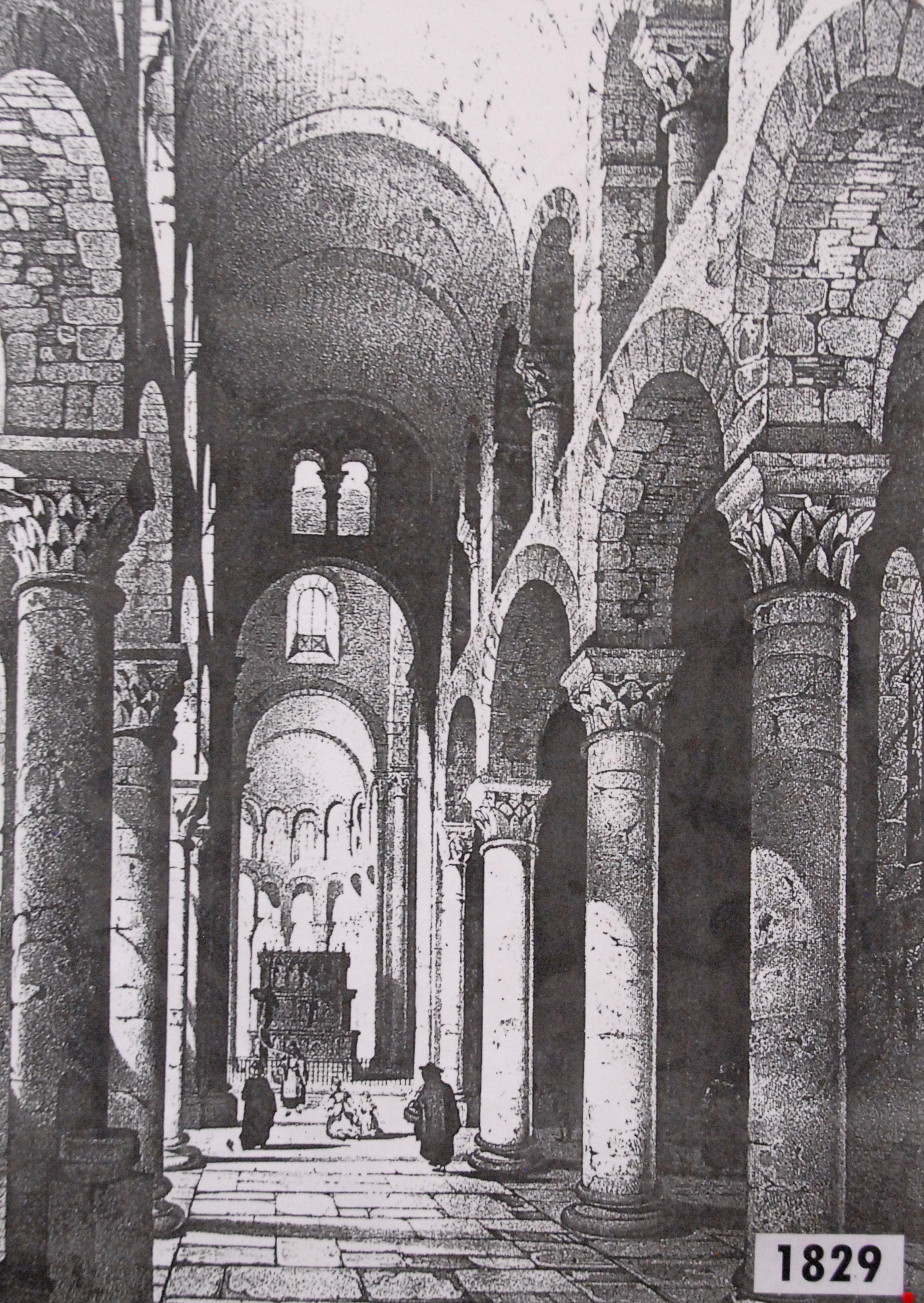 St.-Nectaire, Schiff, Druckgrafik von 1829